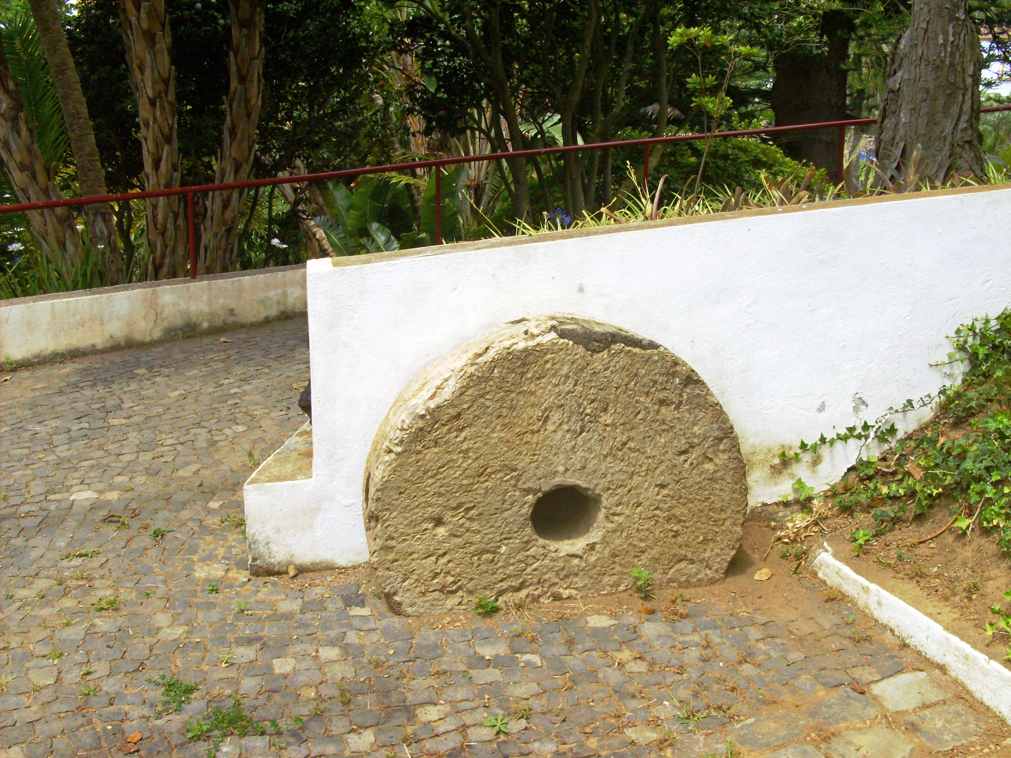 Jardim Duque da Terceira, Angra do Heroísmo, Ilha Terceira, Açores, Portugal: antiga mó.